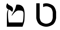 hebrew letter tet